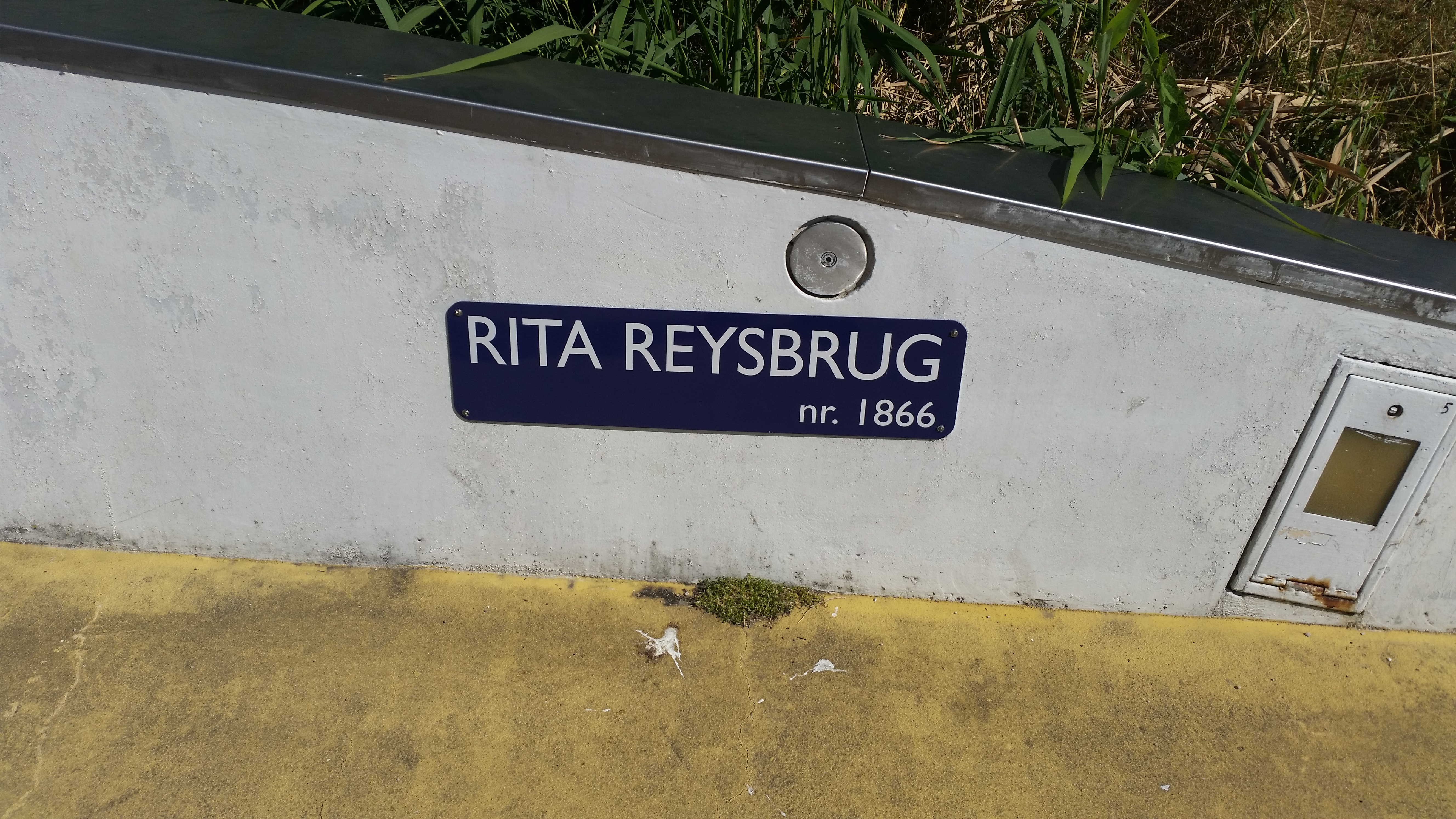 Brug 1866, Rita Reysbrug, naamplaatje